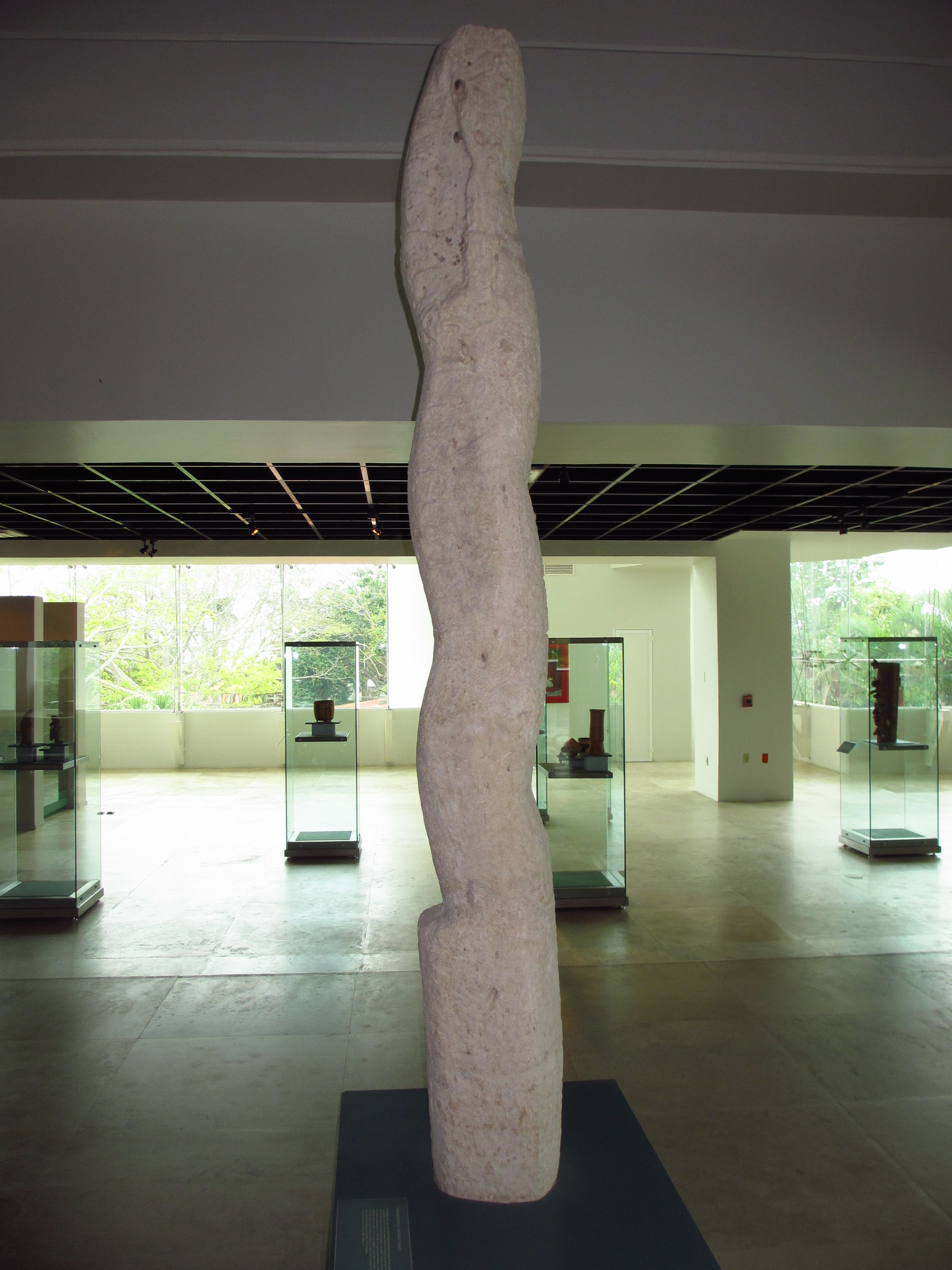 Estela 2 descubierta en la zona arqueológica de Tortuguero, Tabasco, México. Actualmente se encuentra en el Museo de Antropología Carlos Pellicer Cámara de la ciudad de Villahermosa, Tabasco, México. Escultura en piedra caliza de forma ondulada, asemeja a una serpiente, pero tiene brazos humanos que terminan en forma de cabeza de reptiles. Tiene una columna vertebral que fue magistralmente tallada. Además posee glifos en distintas partes del cuerpo.